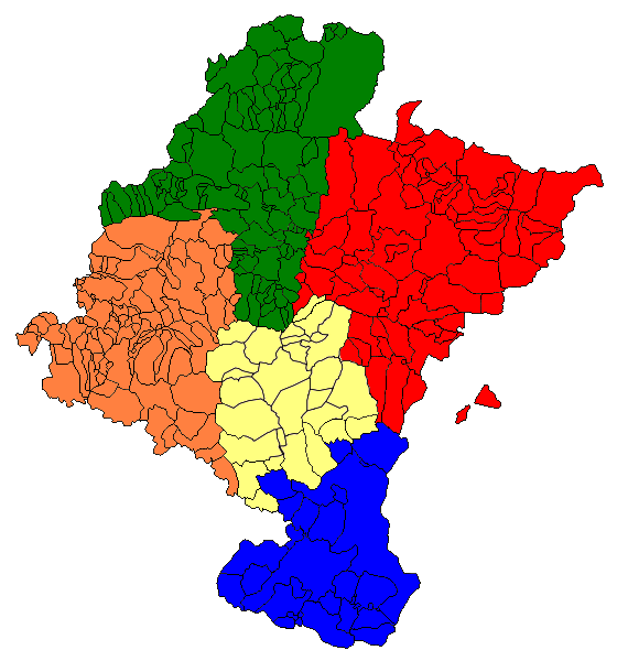 Mapa de las merindades de Navarra